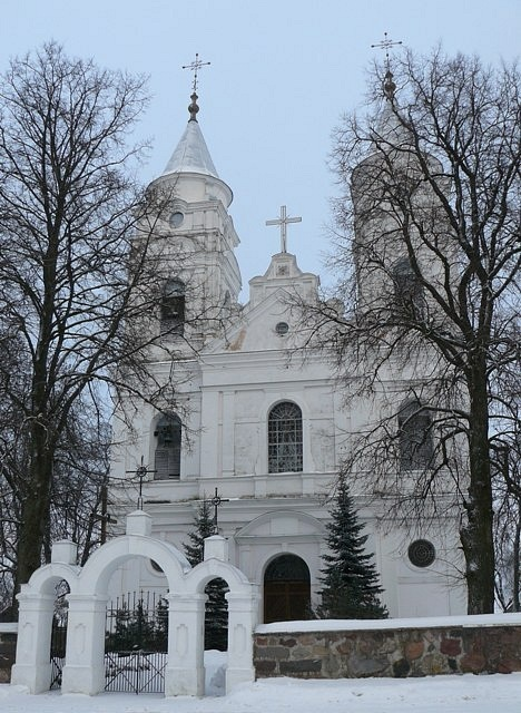 костел Девы Марии, Парафьяново, Докшицкий район, Витебская область. Фото путешествия по Беларуси.